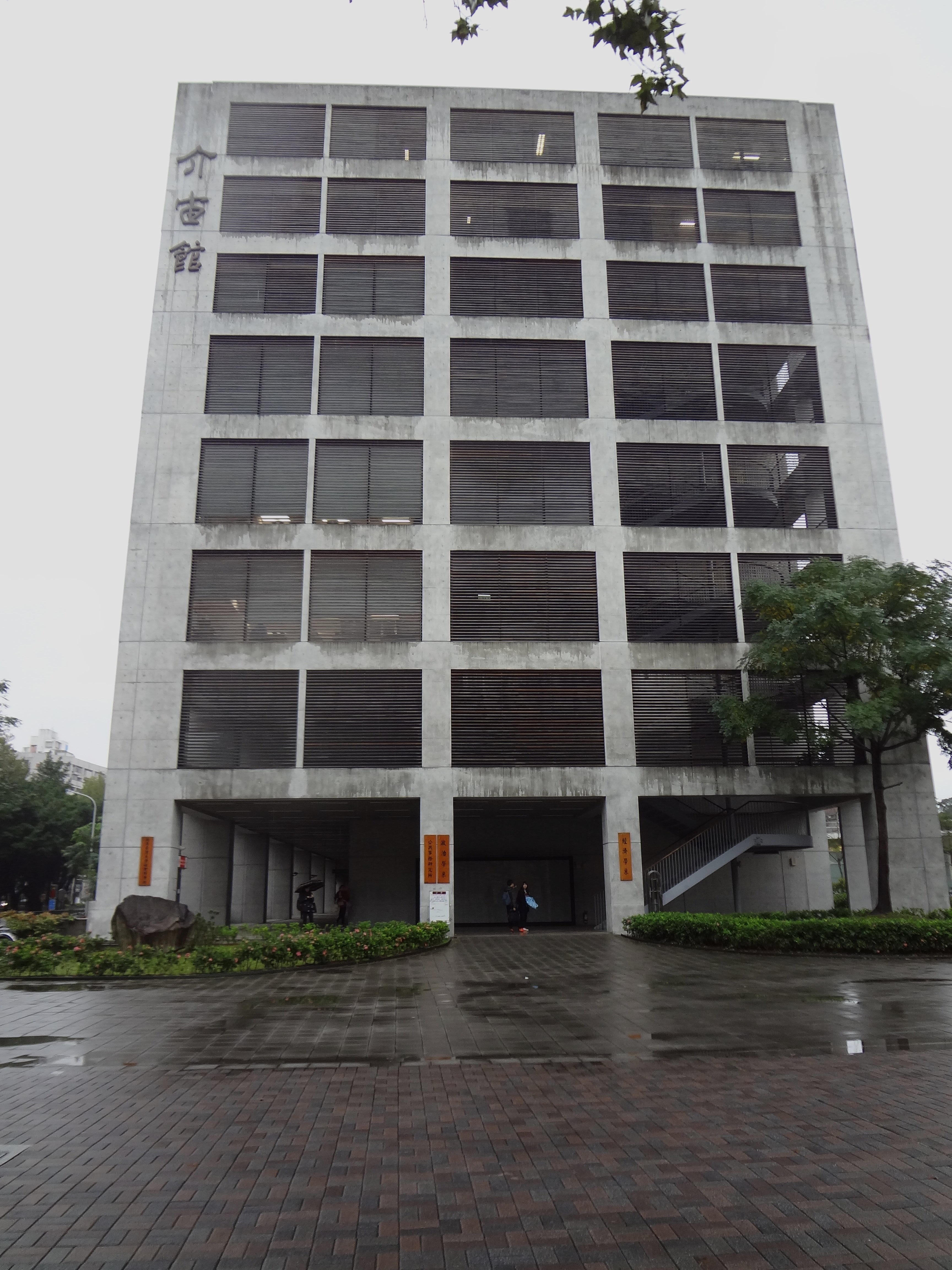 中文（台灣）: 國立臺灣大學介宙館。